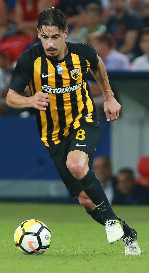 ЦСКА - АЕК